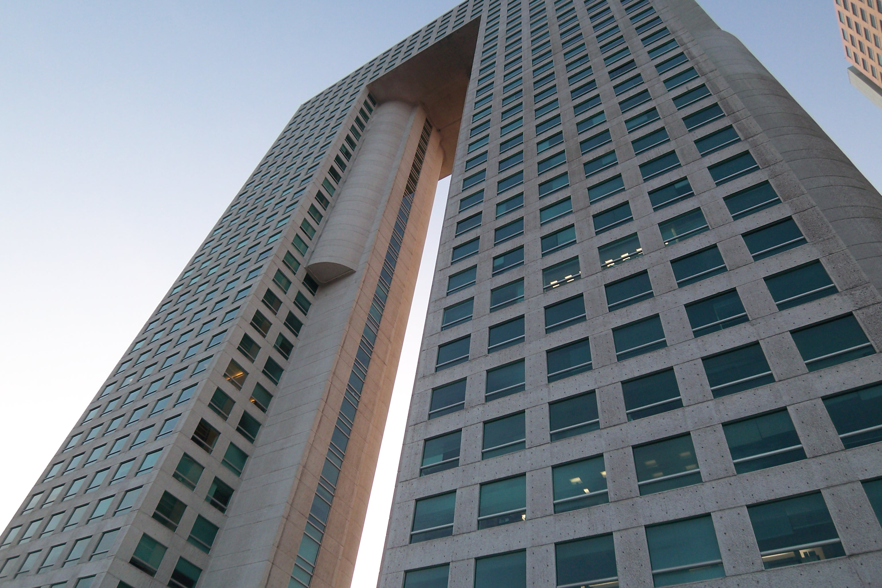 Torre Arcos Bosques, desde abajo.